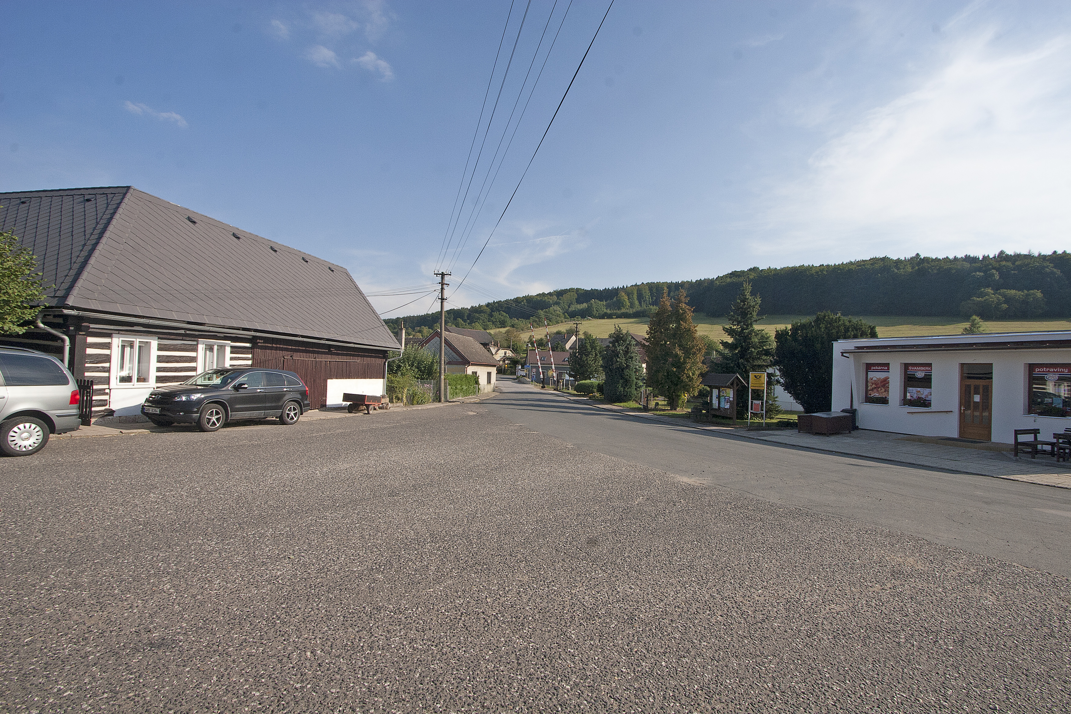 Šárovcova Lhota čp. 9